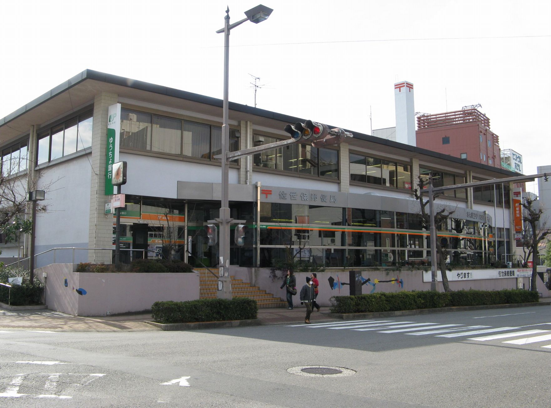 佐世保郵便局 2008年2月 Bakkai撮影